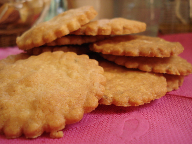 Merci Monsieur Vassallo pour vos sablés au parmesan et au poivre vert ! TROP BON ! Et merci pour la technique de l’étalage entre deux feuilles de papier sulfurisé, FORMIDABLE ! Lire ici